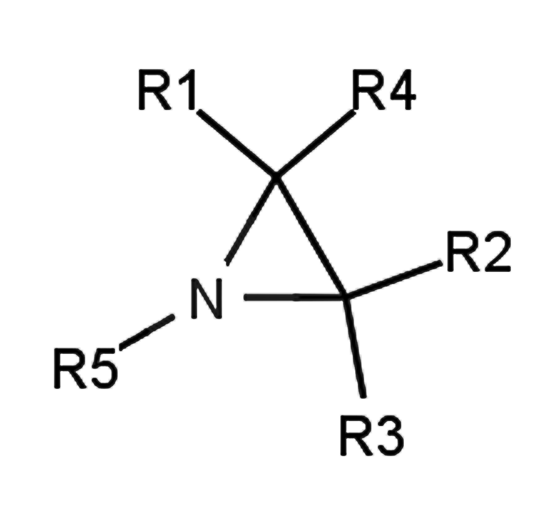 aziridine general structure